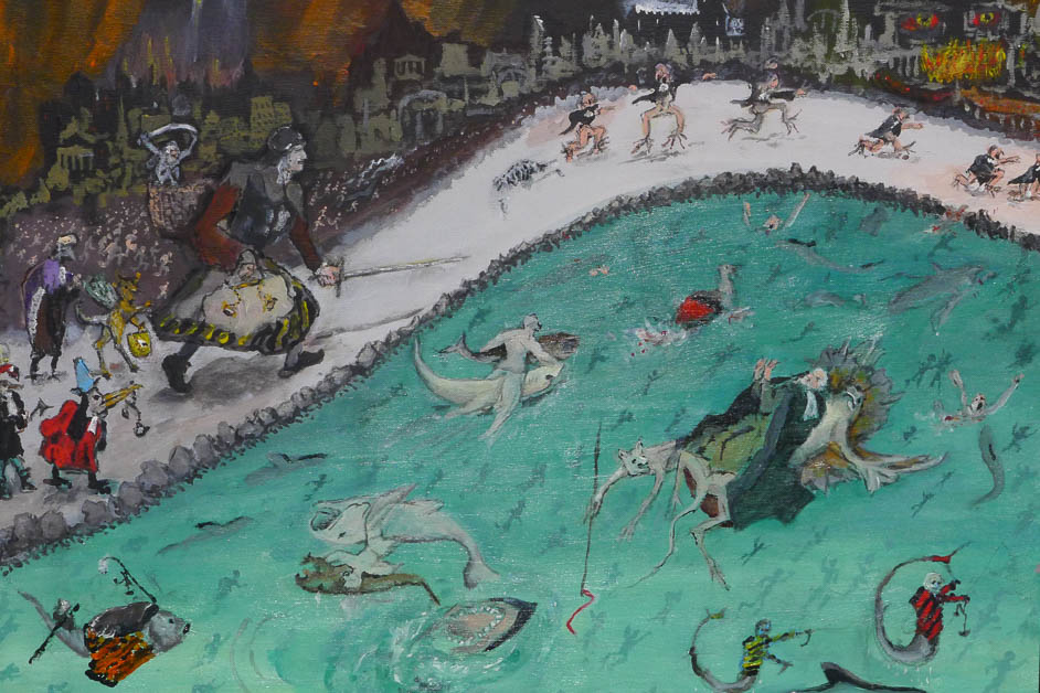 Plaatsvervangend Wetgeefster - (2015) - olieverf op linnen - 80x60 cm - Bouke Bonifacius Jagt, Padang 19420505